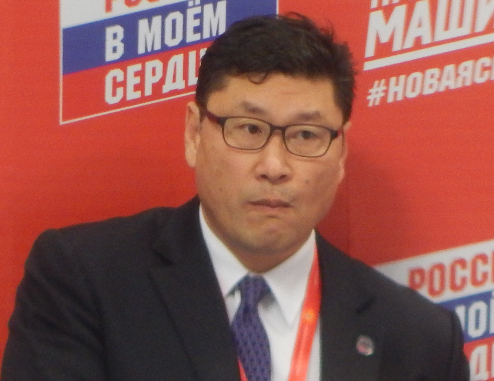 Кубок Первого Канала 2017, матч Канада - Южная Корея (13 декабря 2017) Baek Chi-sun (head coach) and Team Korea players